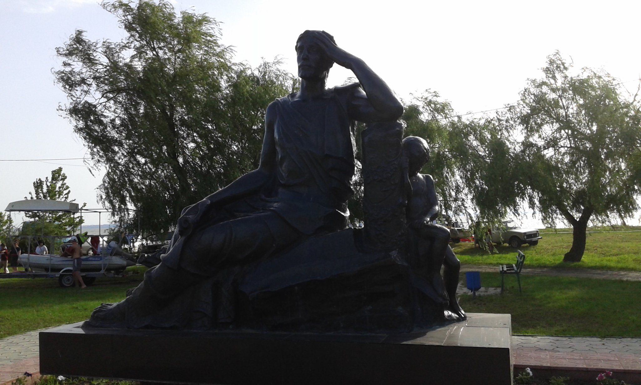 Пам'ятник Овідію в Овідіополі